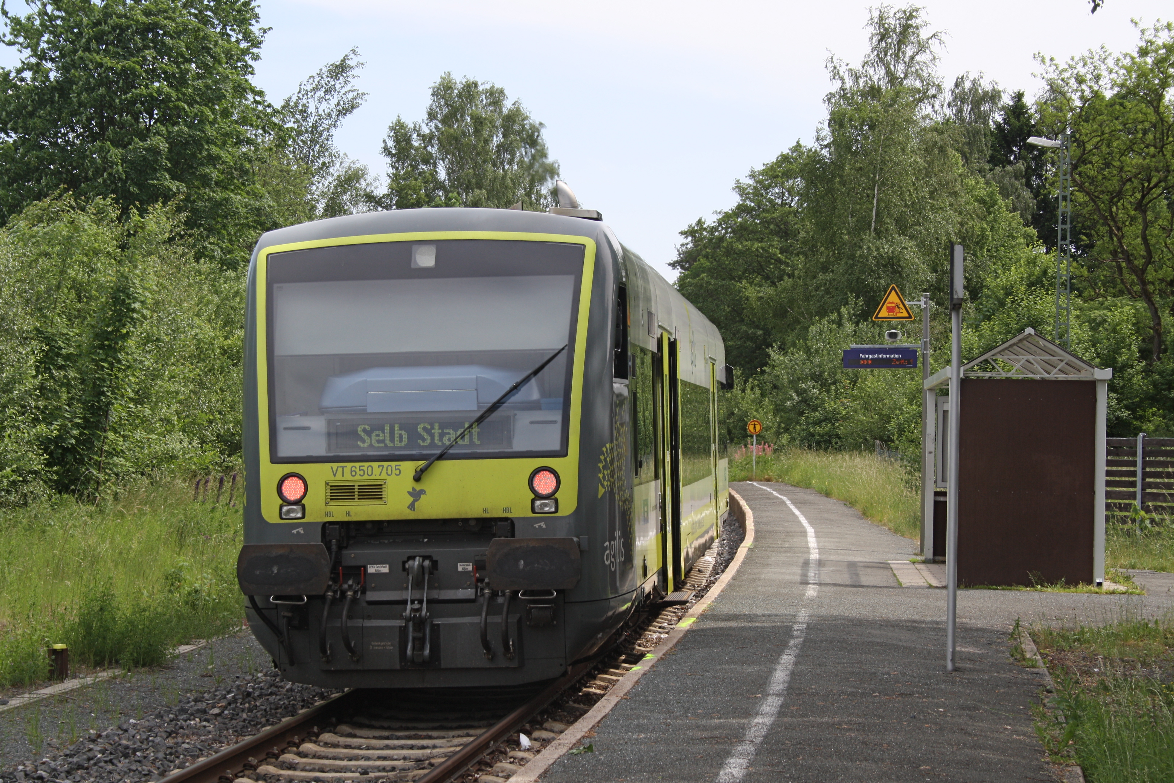 Haltepunkt Schönwald